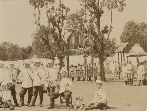 Снимка на войници в лагера при Кула